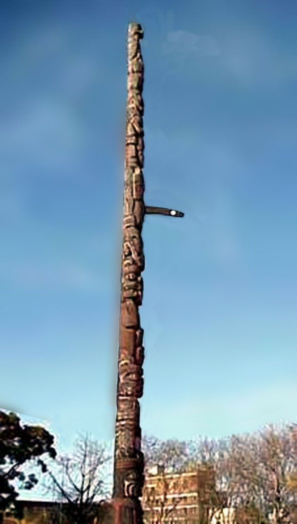 Totem de Plaza Canadá. Tomada en la plaza en diciembre de 2006.